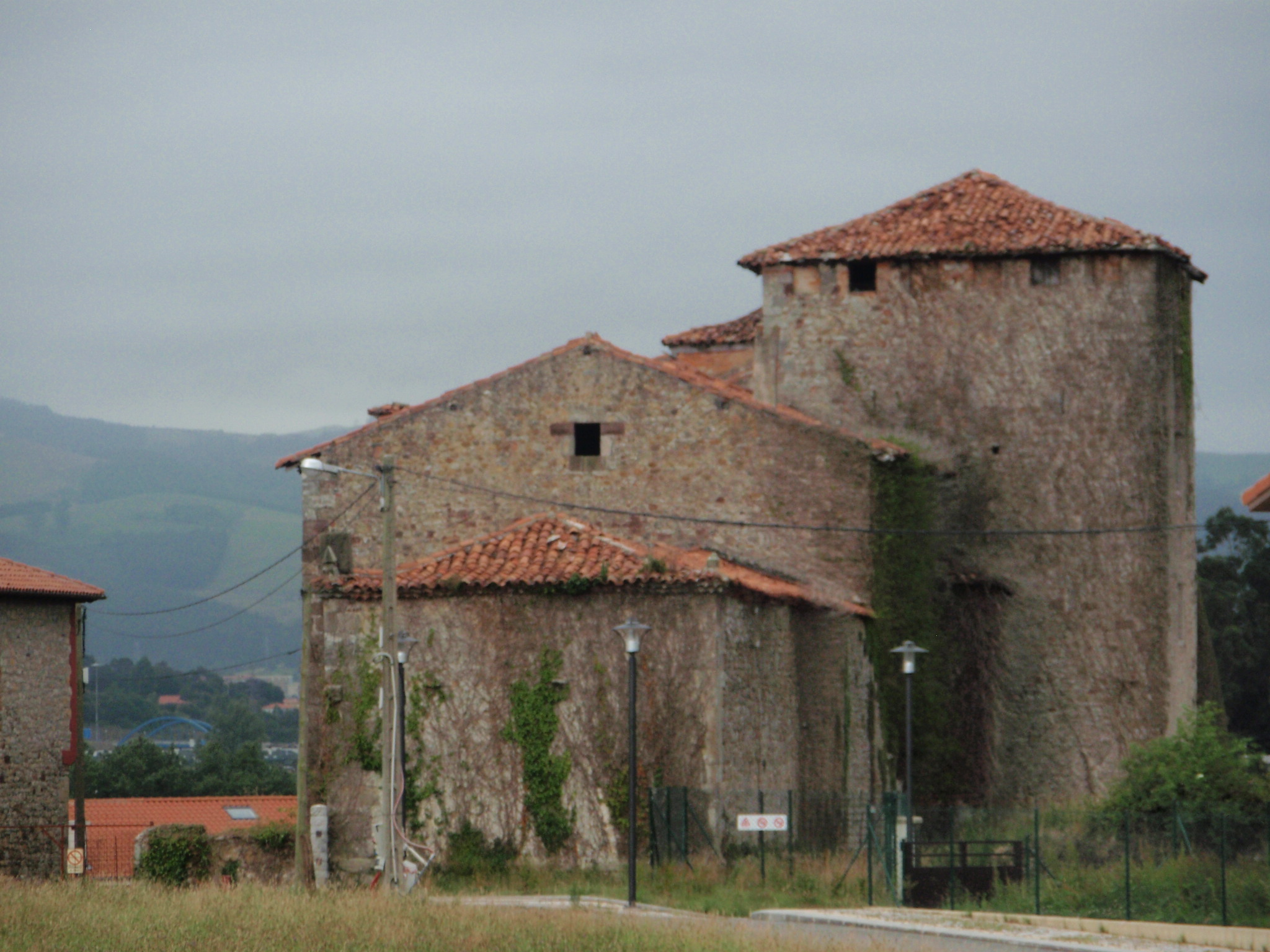 Torre de los Calderón de la Barca en Viveda